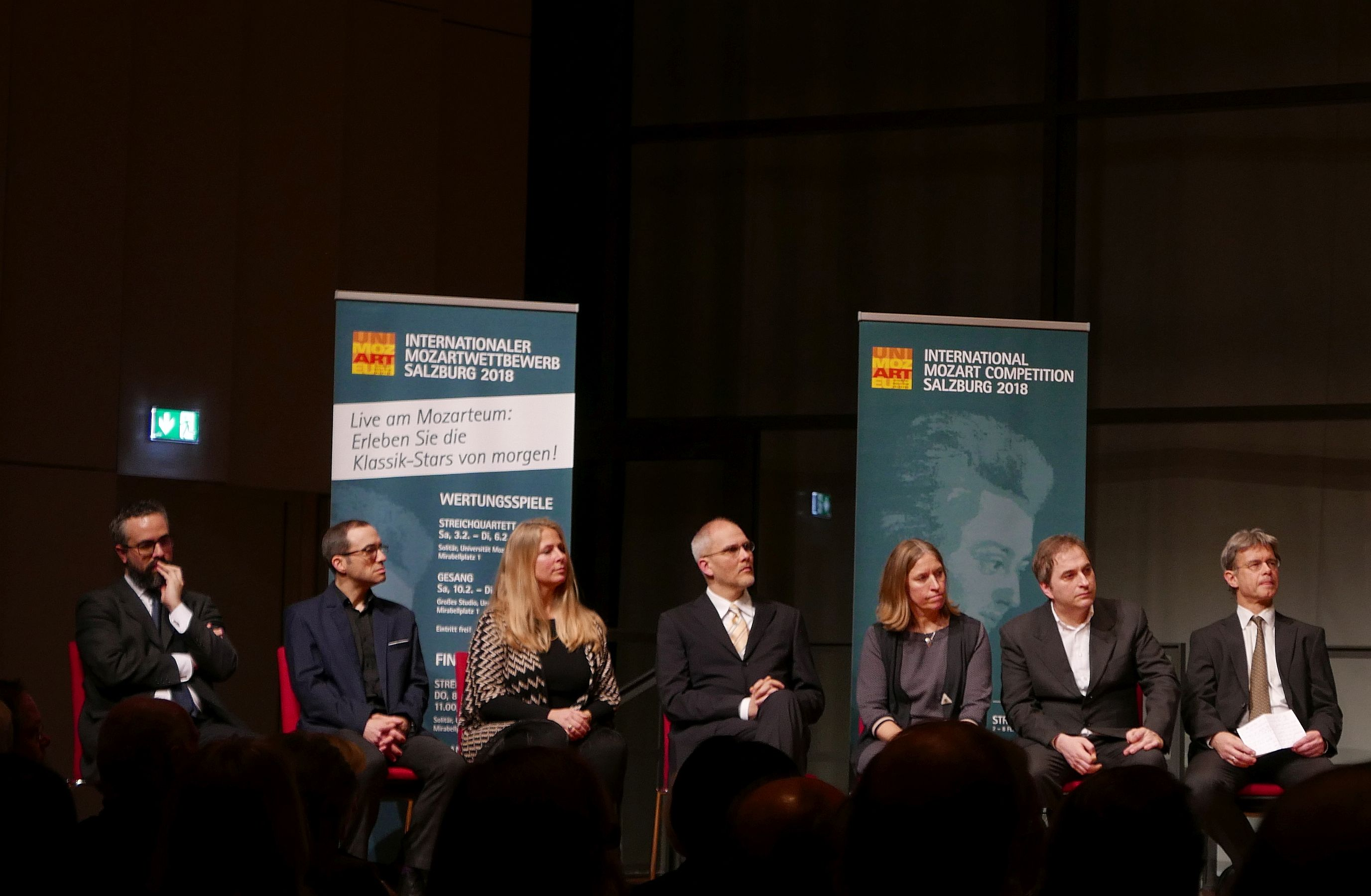 Internationaler Mozartwettbewerb 2018 Streichquartett Preisverleihung - Jury des Wettbewerbs (von renach li): Lukas Hagen (Hagen-Quartett); Enrico Bronzi (Trio di Parma); Sally Pendlebury (Fitzwilliam String Quartett); Jonathan Brown (Cuarteto Casals); Isabel Charisius (Alban Berg Quartett); Mark Steinberg (Brentano Quartett); Cibran Sierra Vázquez (Cuarteto Quiroga)